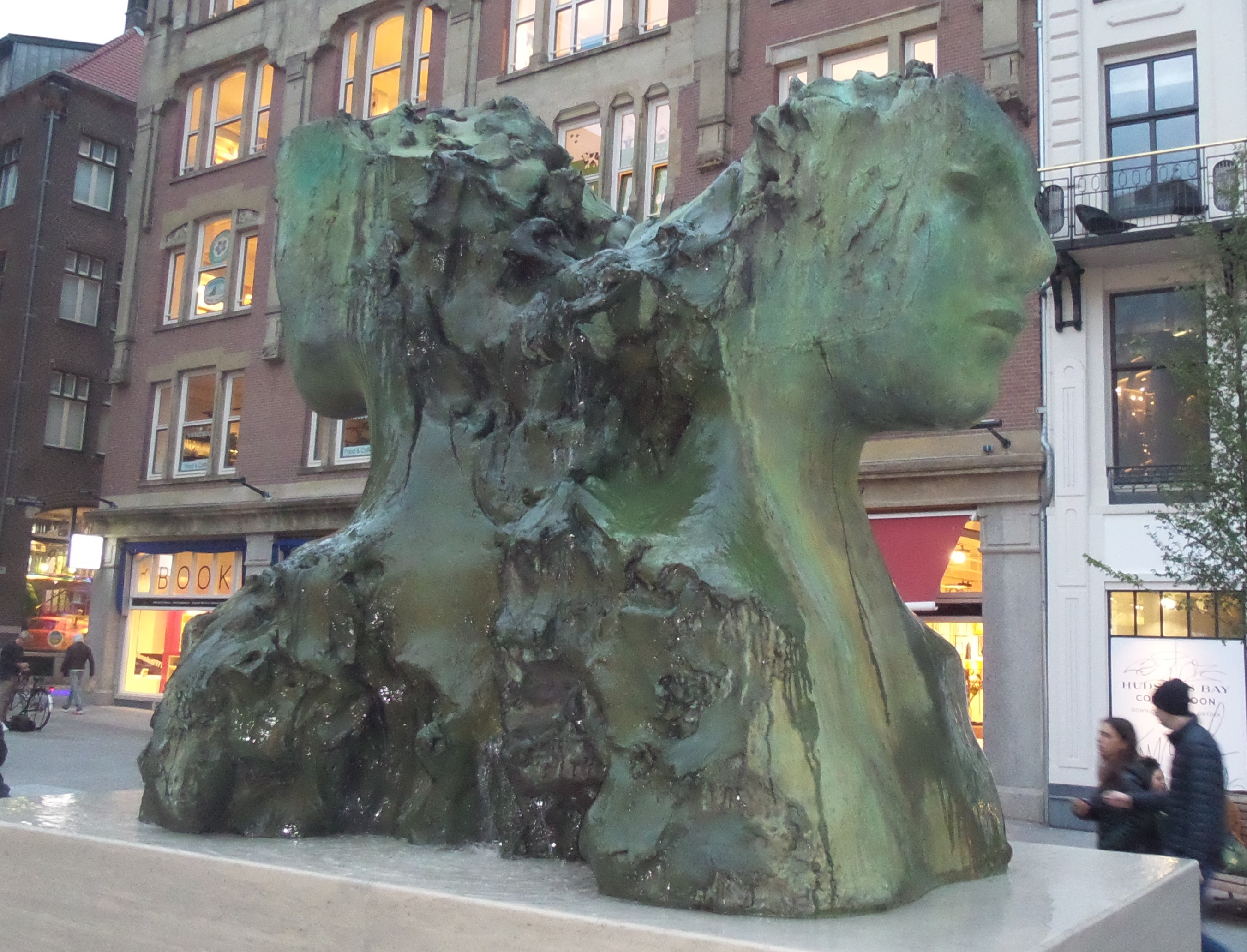 Fontein uit 2017 van Mark Manders in Amsterdam op het Rokin Het kunstwerk bestaat uit een gepatineerd brons, Gascogne Azul ( natuursteen) en water.